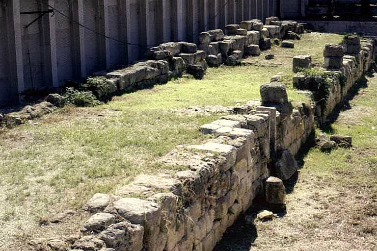 Mura greche sul lungomare di Reggio Calabria